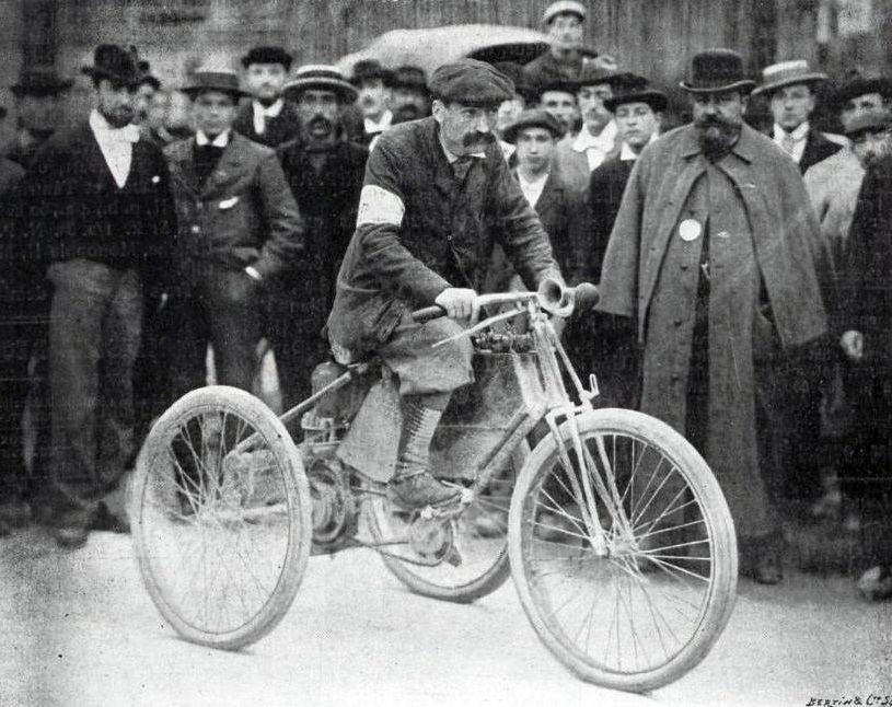 Jean-Marie Corre, vainqueur des motocycles au Critérium des entraîneurs 1898 (Paris-Bordeaux) - La Vie au Grand Air du 15 mai 1898, p.54 (et Panajou)